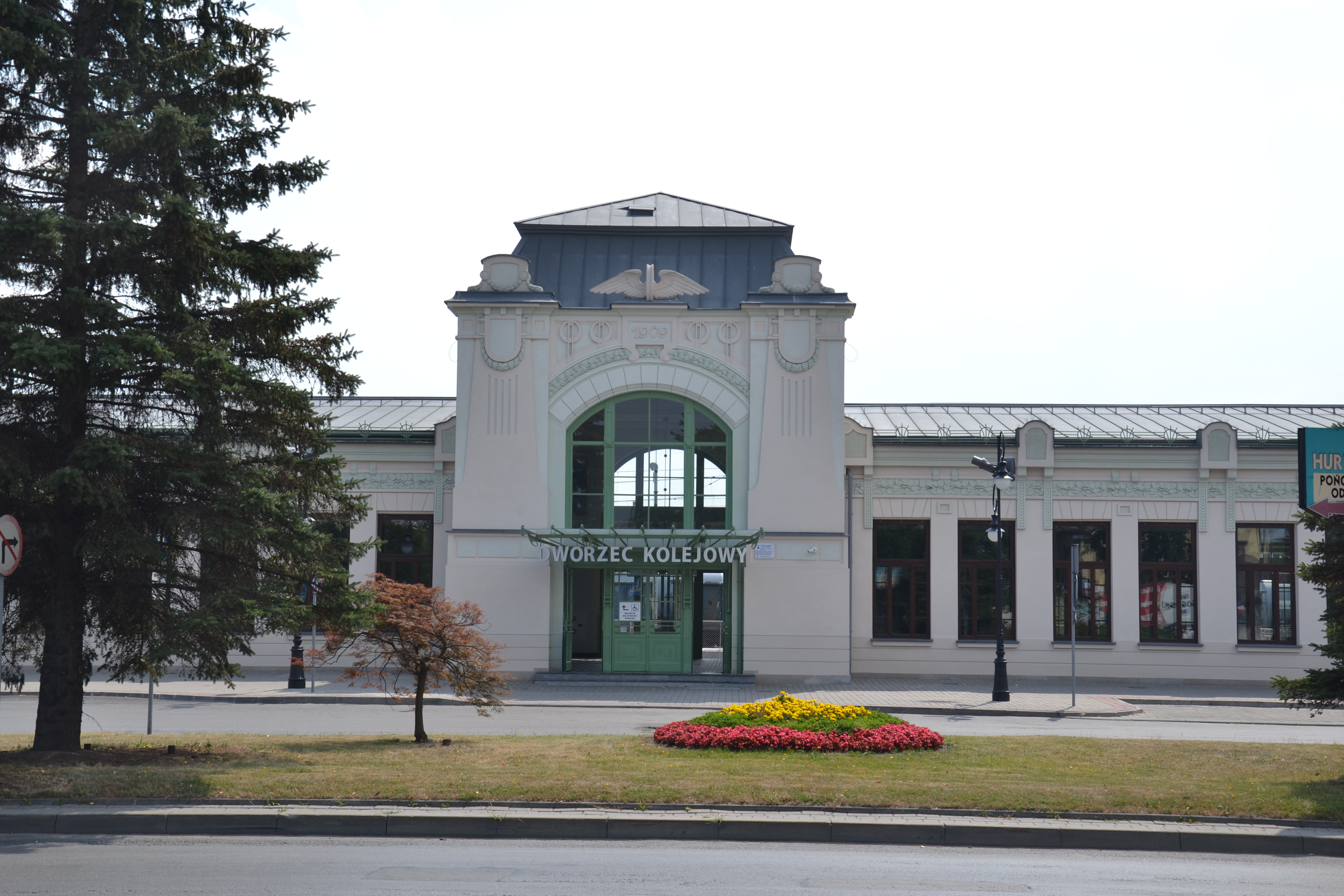 Widok dworca kolejowego w Nowym Sączu od strony miasta This photo was taken during Railway Wikiexpedition 2015 set up by Wikimedia Polska Association in cooperation with Fundacja Grupy PKP. You can see all photographs in category Wikiekspedycja kolejowa 2015.